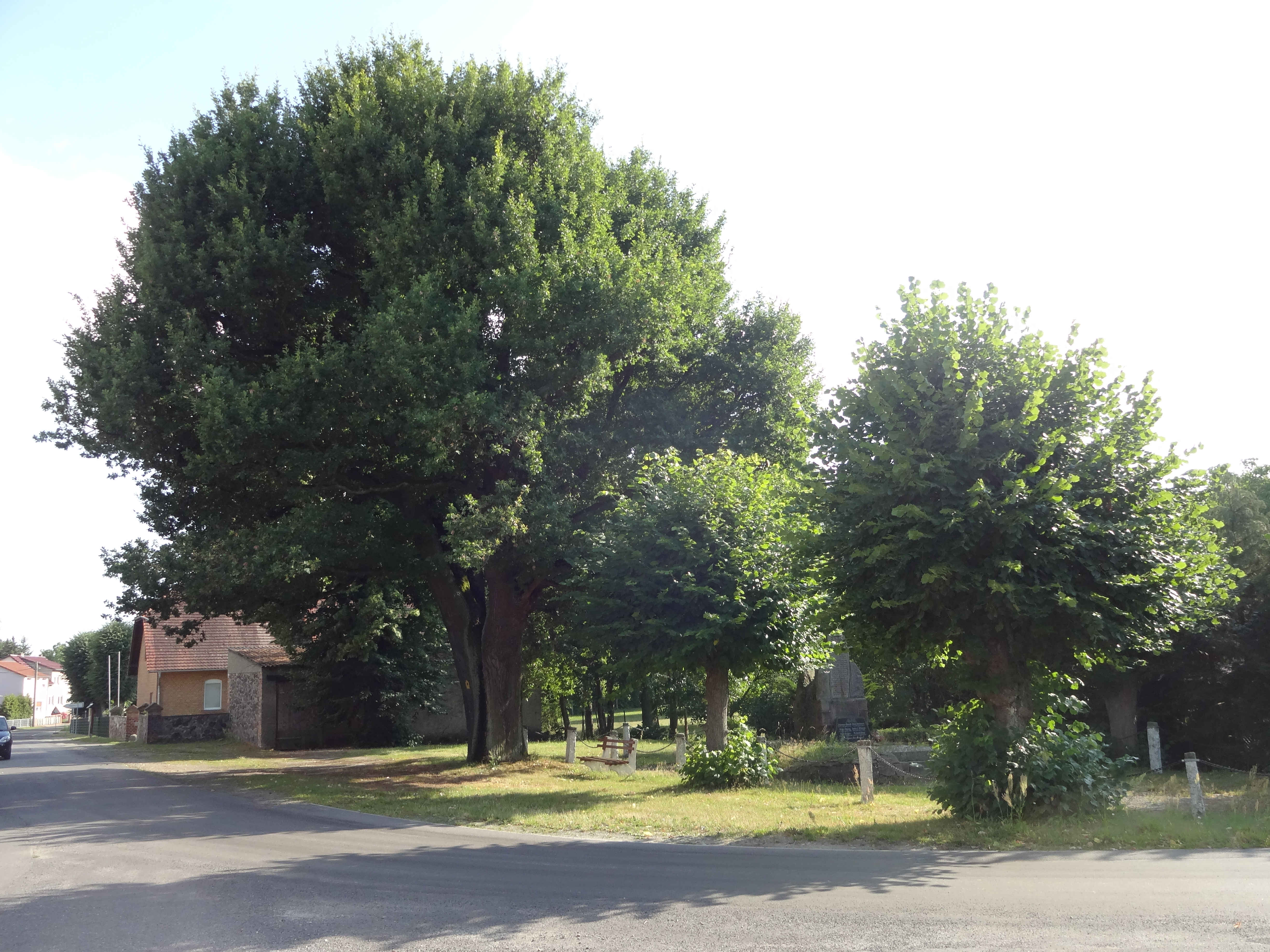 als Naturdenkmal geschützte Stieleiche am Kriegerdenkmal in Bronkow